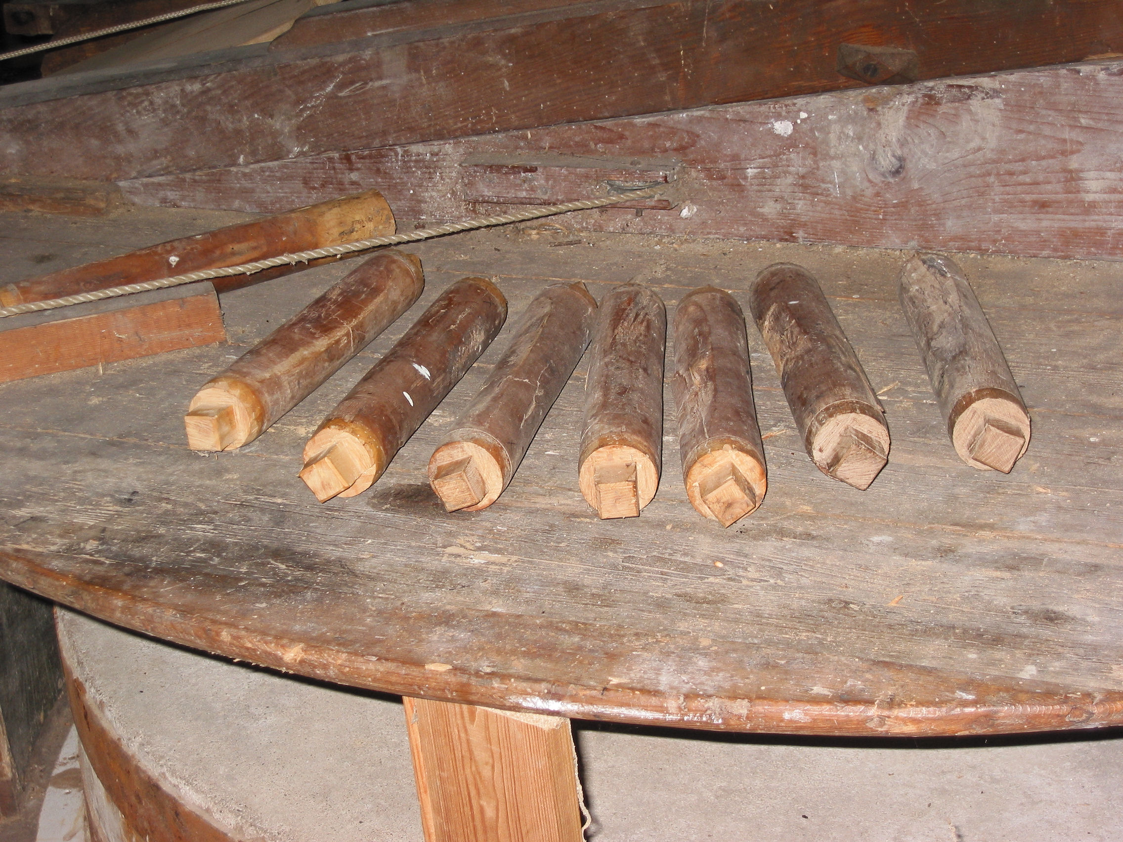 Molen De Hoop in Appel, staven van het steenspilrondsel, Gelderland, the Netherlands